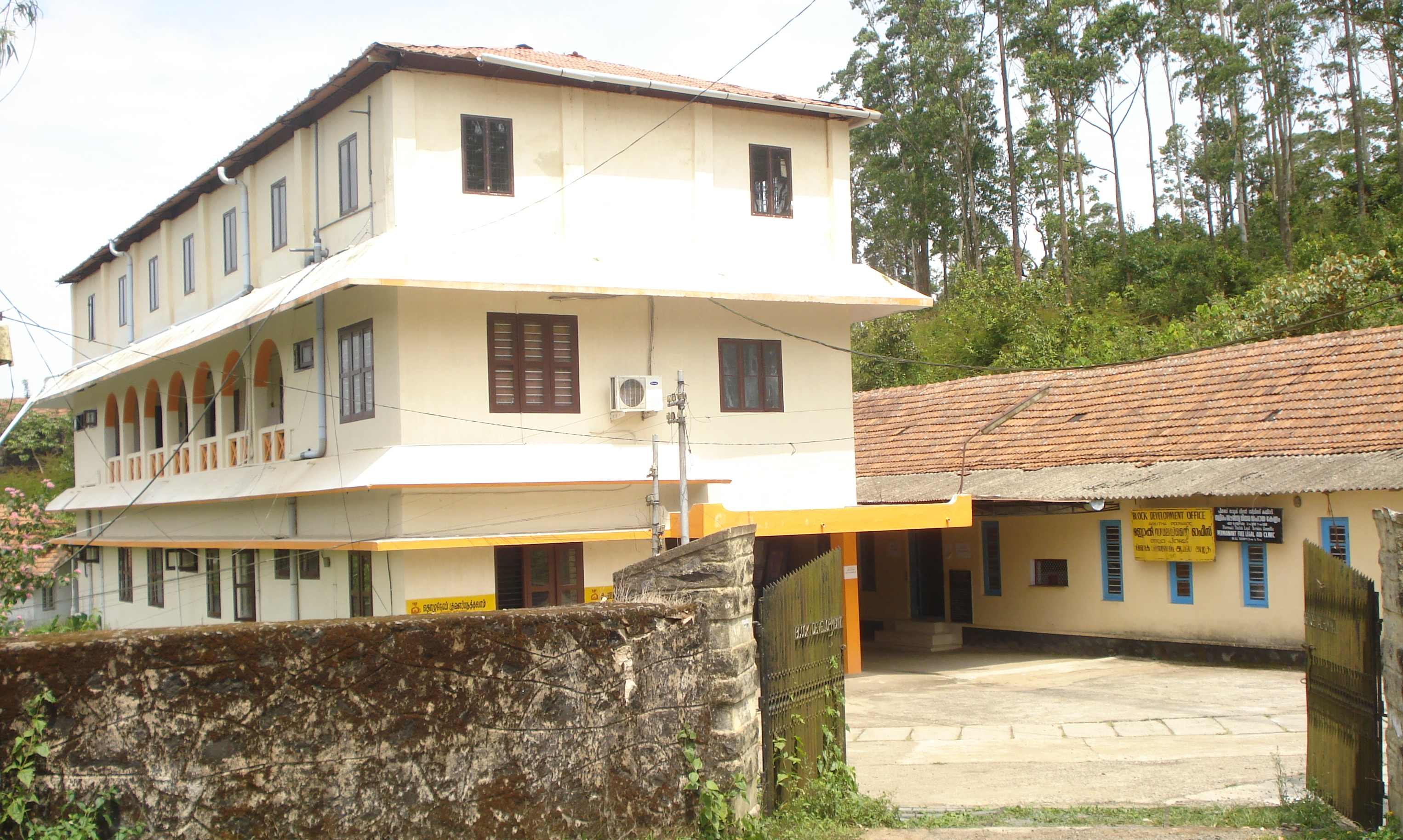 അഴുത ബ്ലോക്ക് പഞ്ചായത്ത് ഓഫീസ് കെട്ടിടം- പീരുമേട്